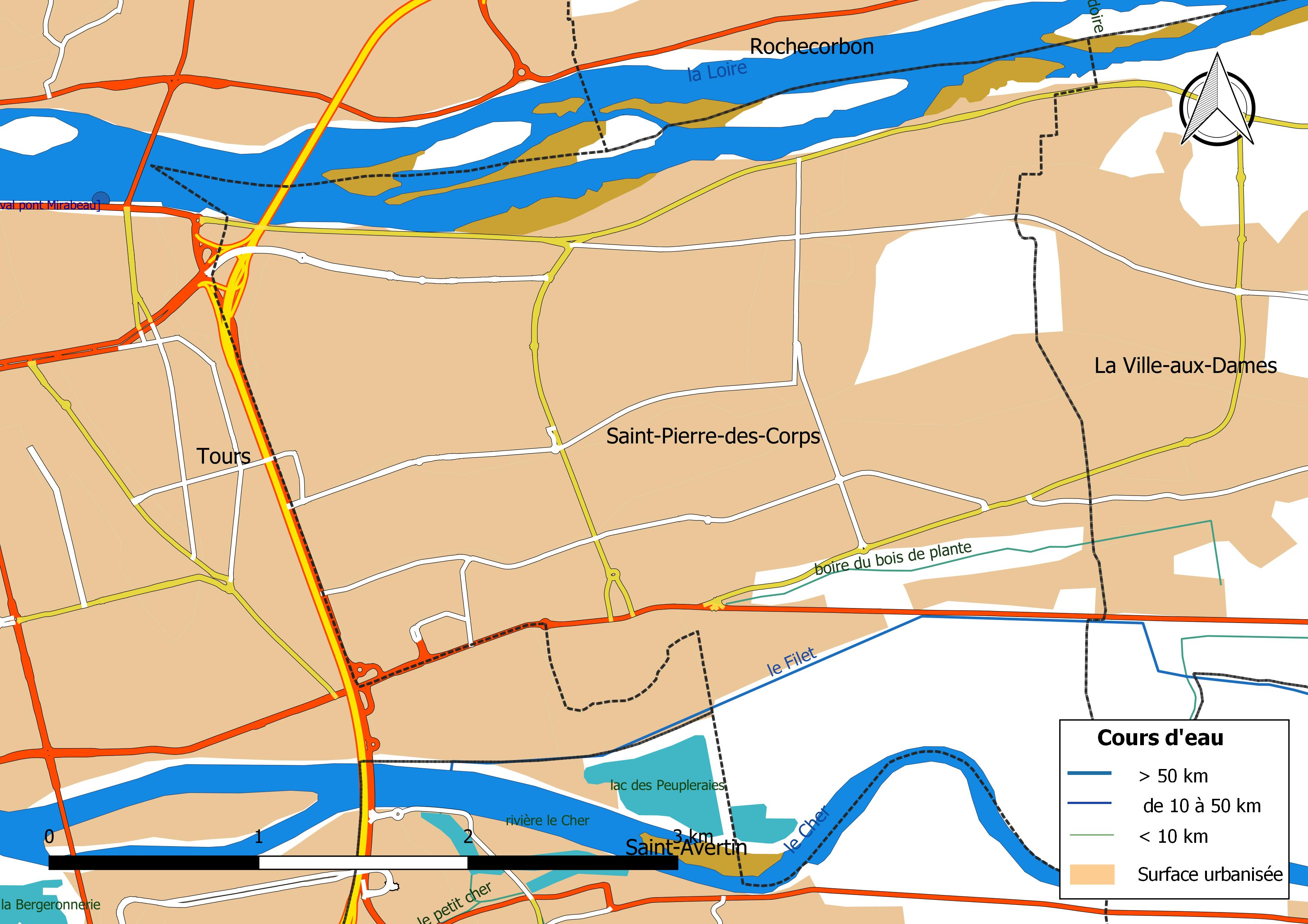 Carte du réseau hydrographique de la commune de Saint-Pierre-des-Corps (France).